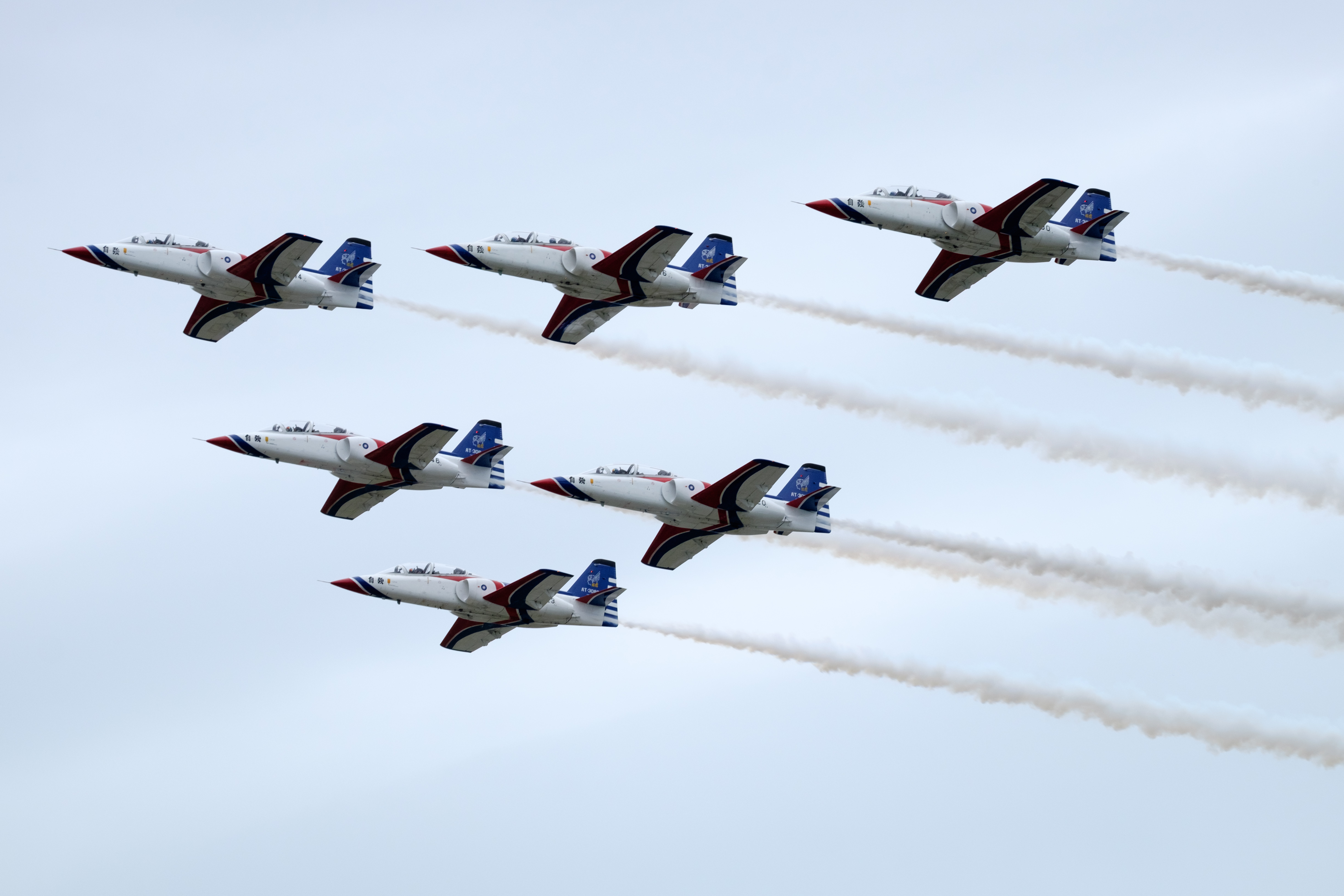 2016年空軍花蓮基地營區開放活動，雷虎小組AT-3六機箭型編隊低空通過。